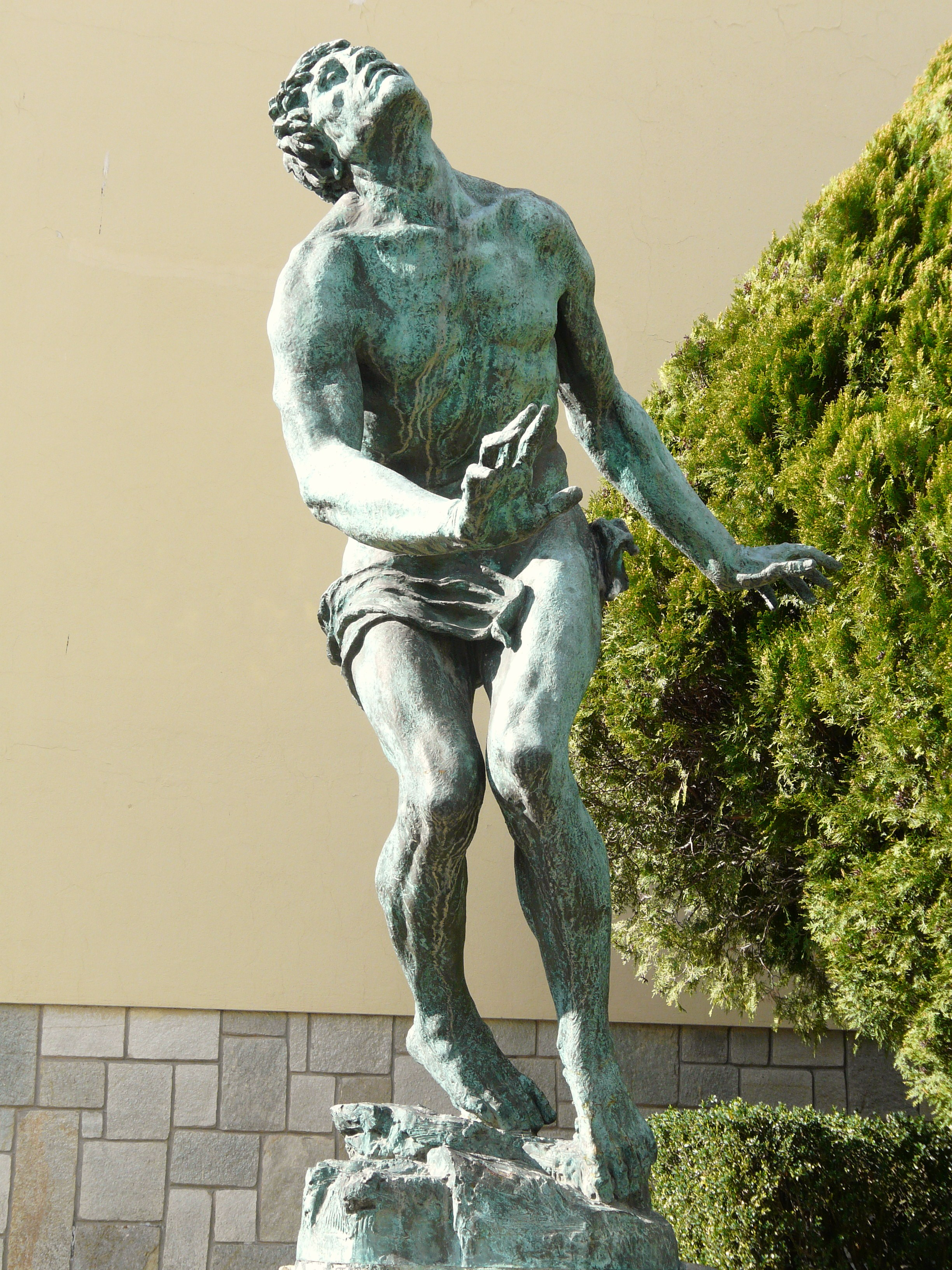 Monumento ai caduti, Carpasio, Liguria, Italia